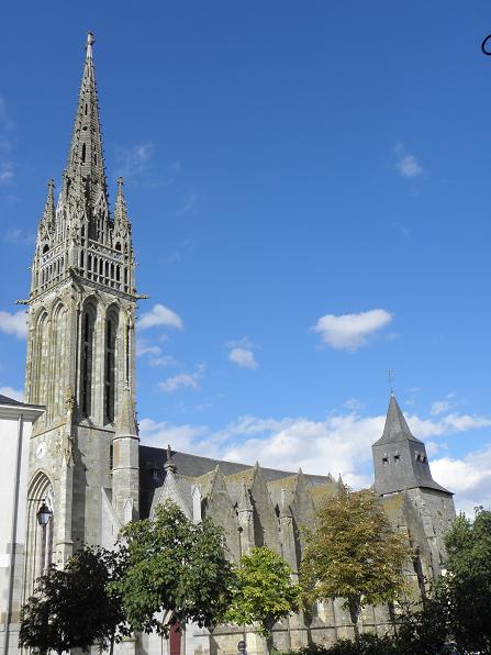 Flanc sud de la basilique N.D. de La Guerche-de-Bretagne (35)